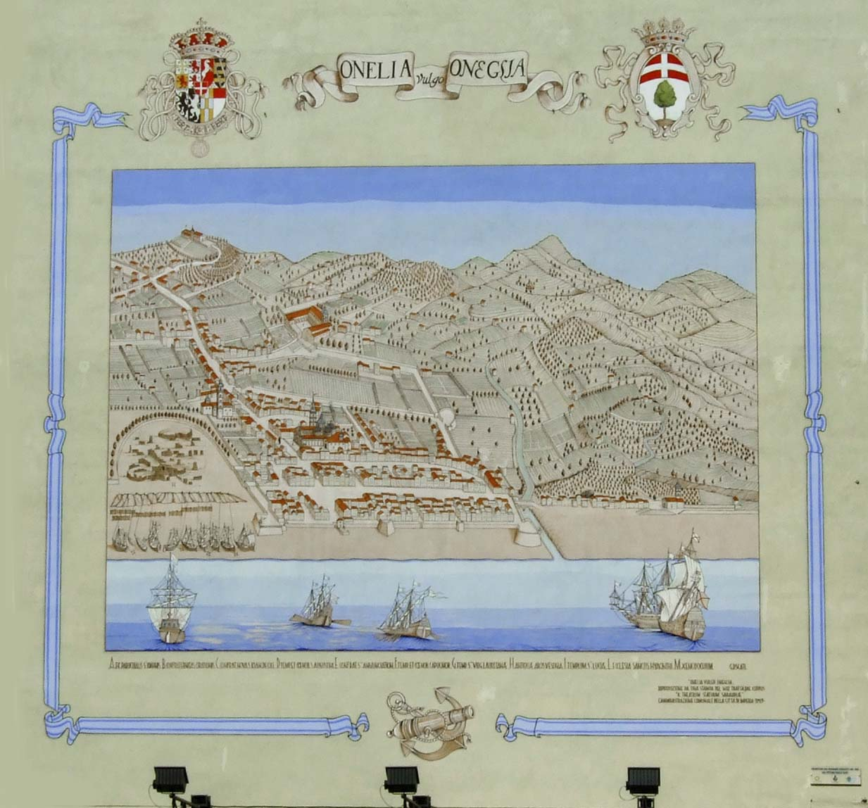 Affresco presente in Piazza San Giovanni a Imperia. Oneille au XVIIIe siécle représentée sur une fresque d'un immeuble de la place San Giovanni à Imperia.